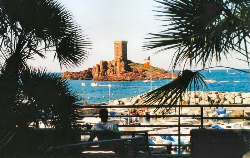 Le Dramont Chris Cremie